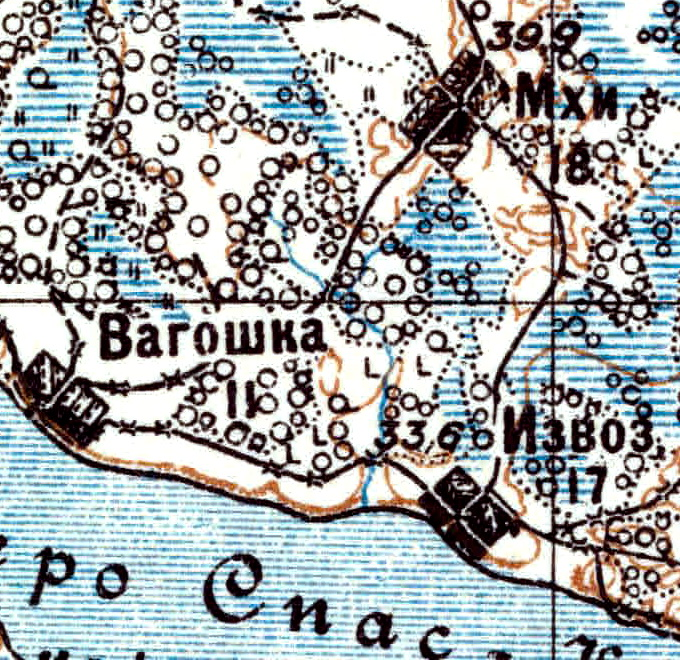 Топографическая карта Ленинградской области, квадрат VIc-26 (Ставотино), деревни Вагошка, Мхи и Извоз